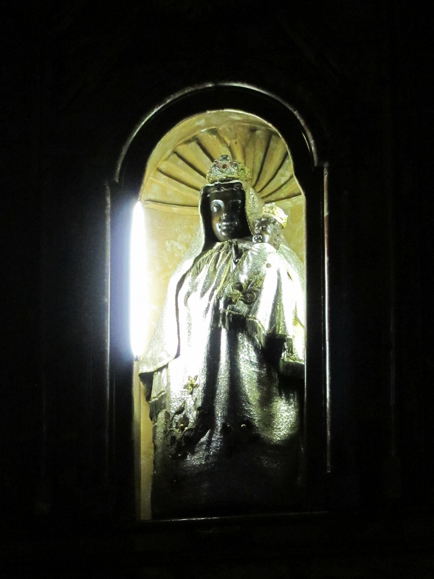 La vierge noire du XIIIème siècle de la Basilique Notre-Dame-des-Miracles de Mauriac (Cantal).